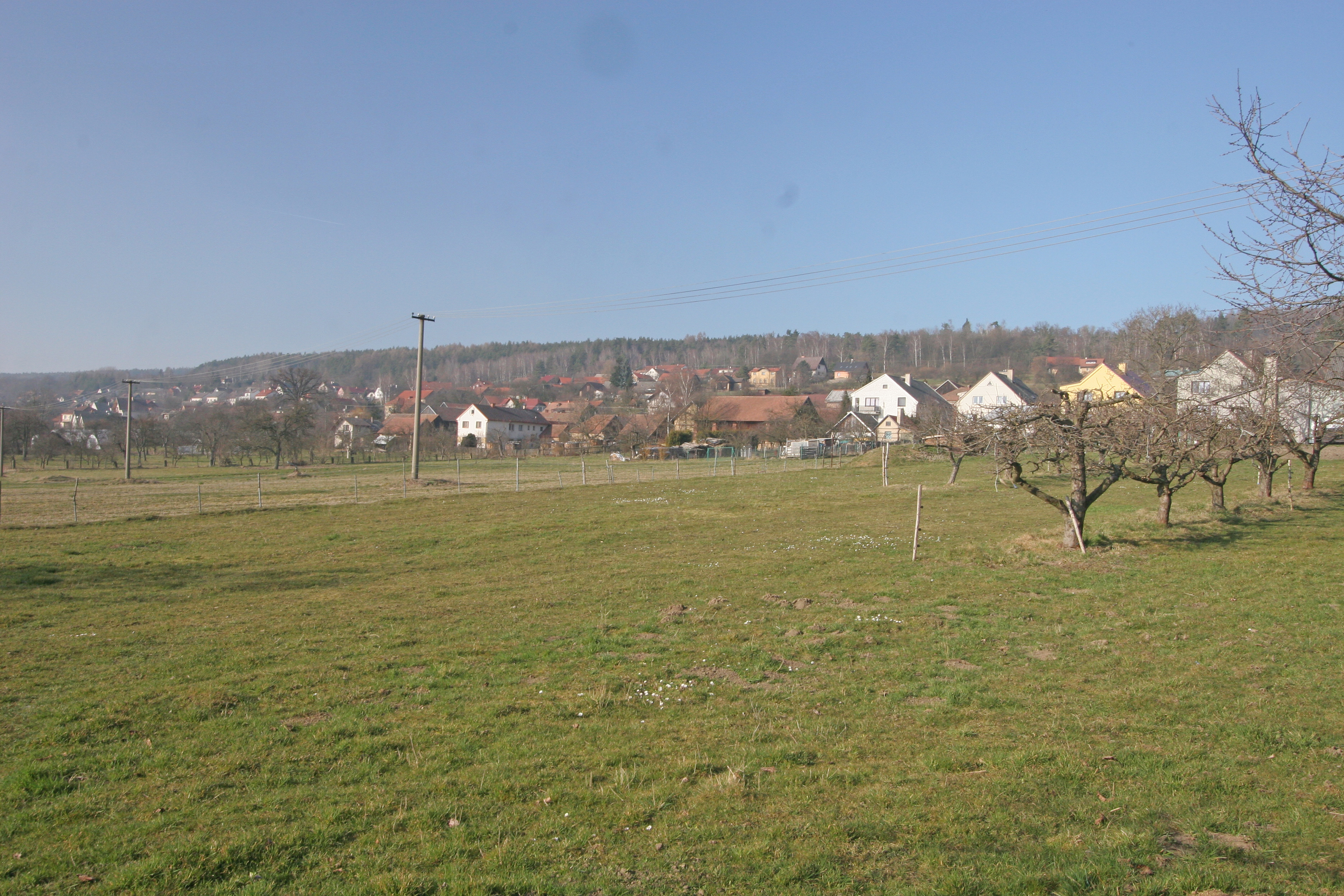 Podhorní Újezd od farmy